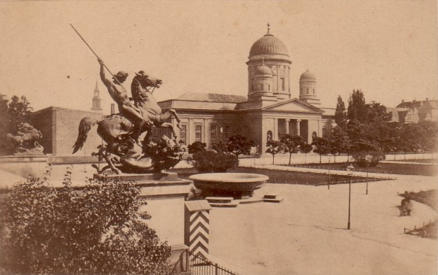 Ansicht des Schinkel-Doms im Berliner Lustgarten mit Campo Santo, nach 1848.